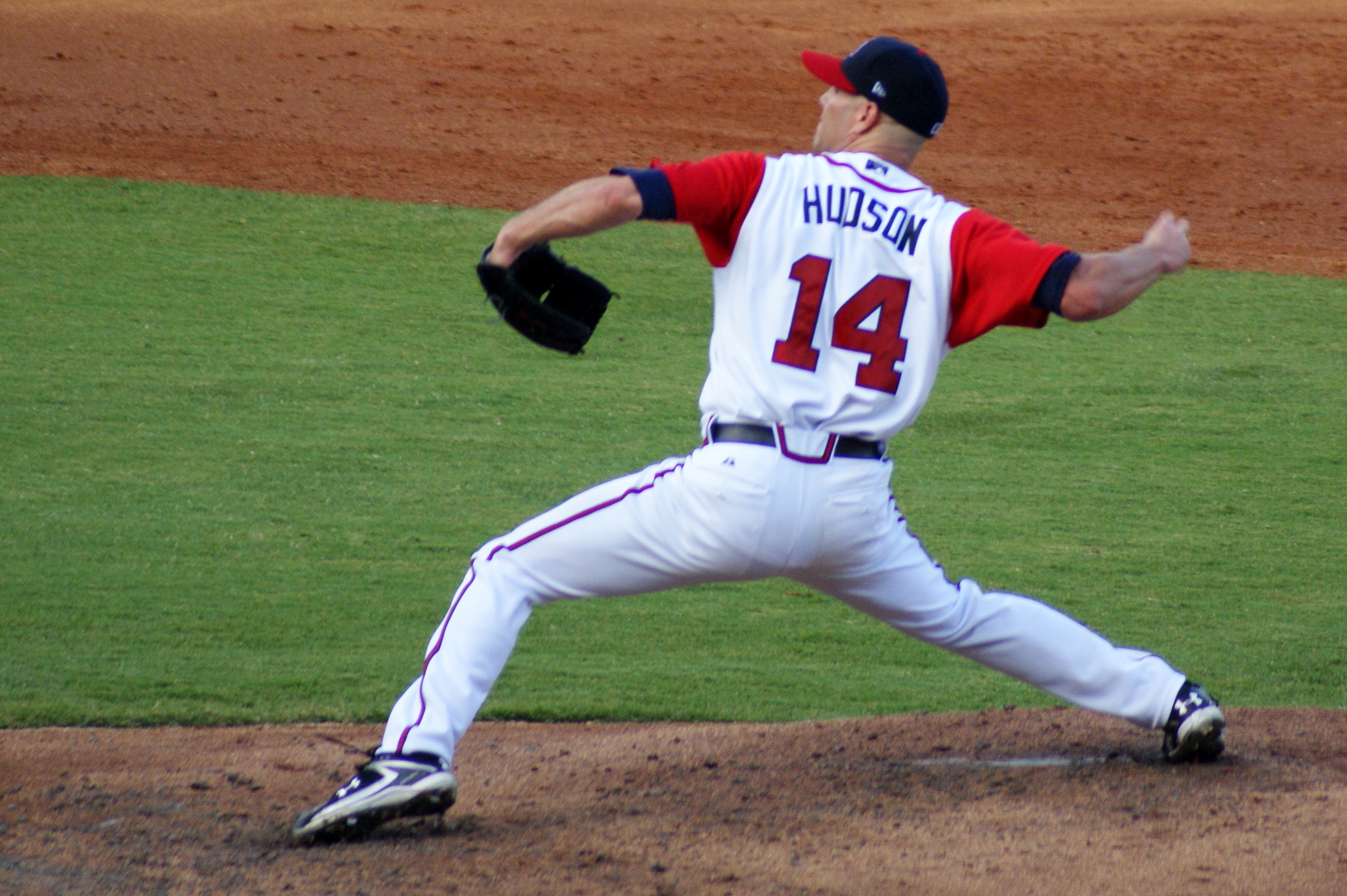 Tim Hudson